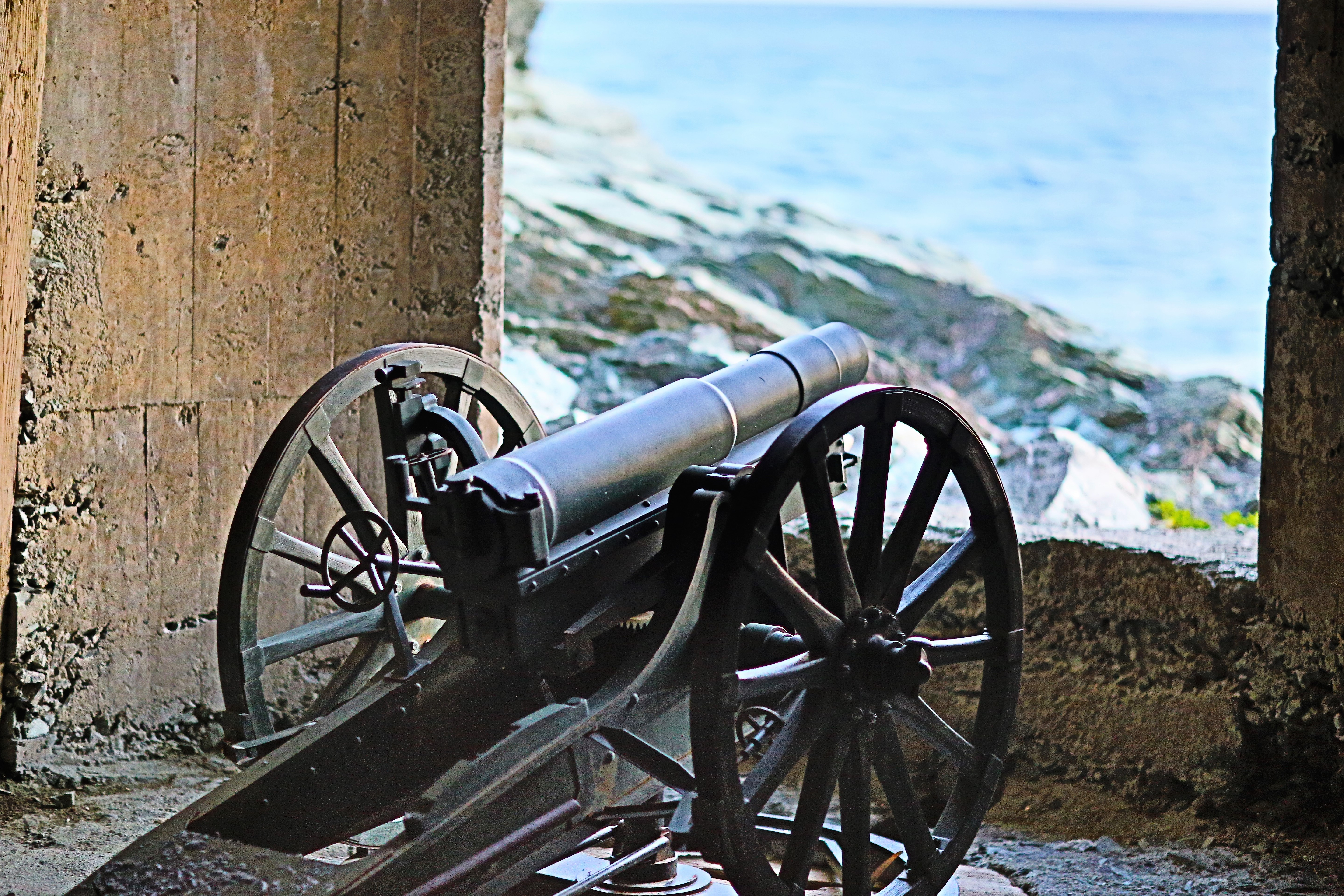 愛媛県の芸予要塞の佐田岬第4砲台.三八式十二糎榴弾砲（レプリカ）